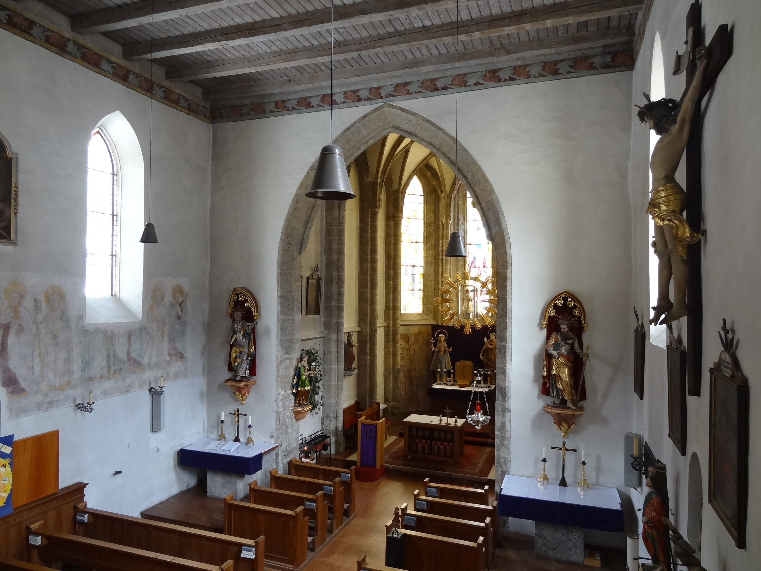 Saints Peter and Paul Church (Filzmoos)